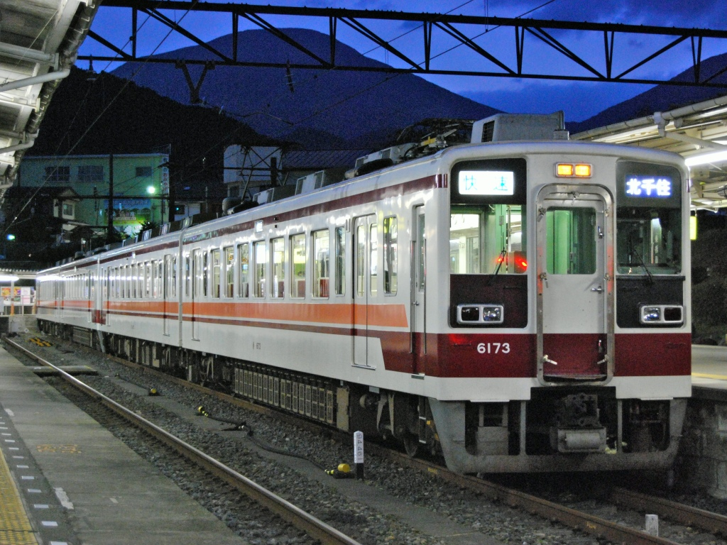 東武6050系電車6173編成・臨時増発の「快速北千住ゆき」4両（2008/10/26・東武日光にて撮影）